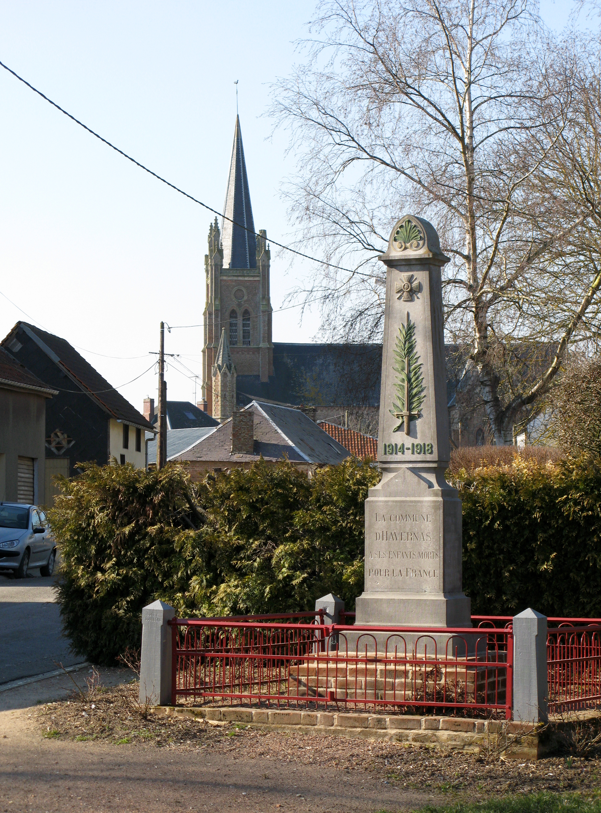 Havernas (Somme, France) - Le monument-aux-morts et l'église. .